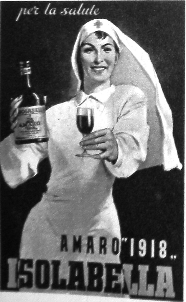 Pubblicità di 1918 dell'Amaro 18 Isolabella - Italia.